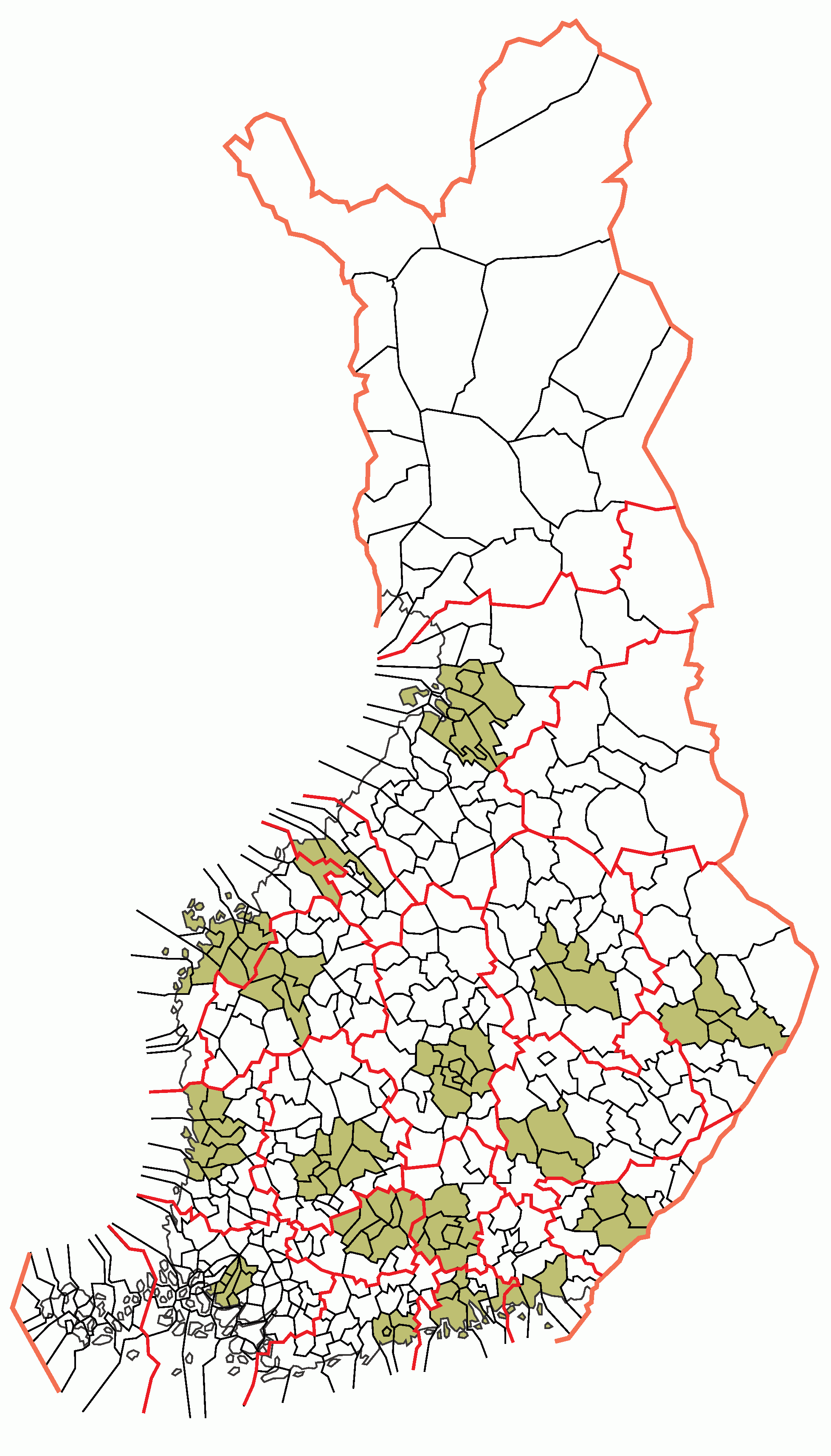 "Hallituksen esitys Eduskunnalle laiksi kunta- ja palvelurakenneuudistuksesta sekä laeiksi kuntajakolain muuttamisesta ja varainsiirtoverolain muuttamisesta". § 7 mainitut kaupunkiseudut.